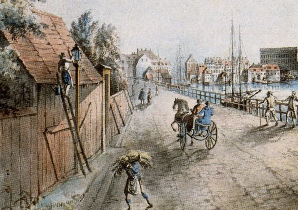 En lykttändare, vy från Kungsholmen över Stockholm med nya Kungsholmsbron (bilden är beskuren)